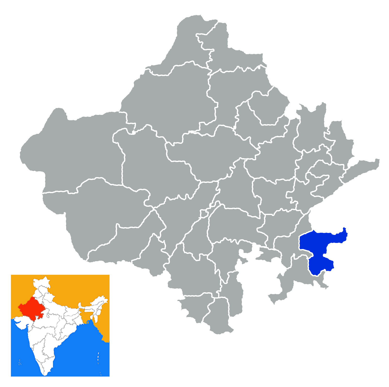 Distrito de Baran Rajastan India